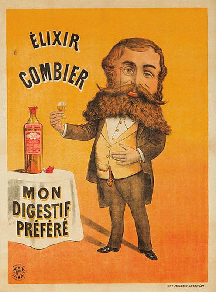 Étiquette du milieu du XIXe siècle de l'élixir Combier